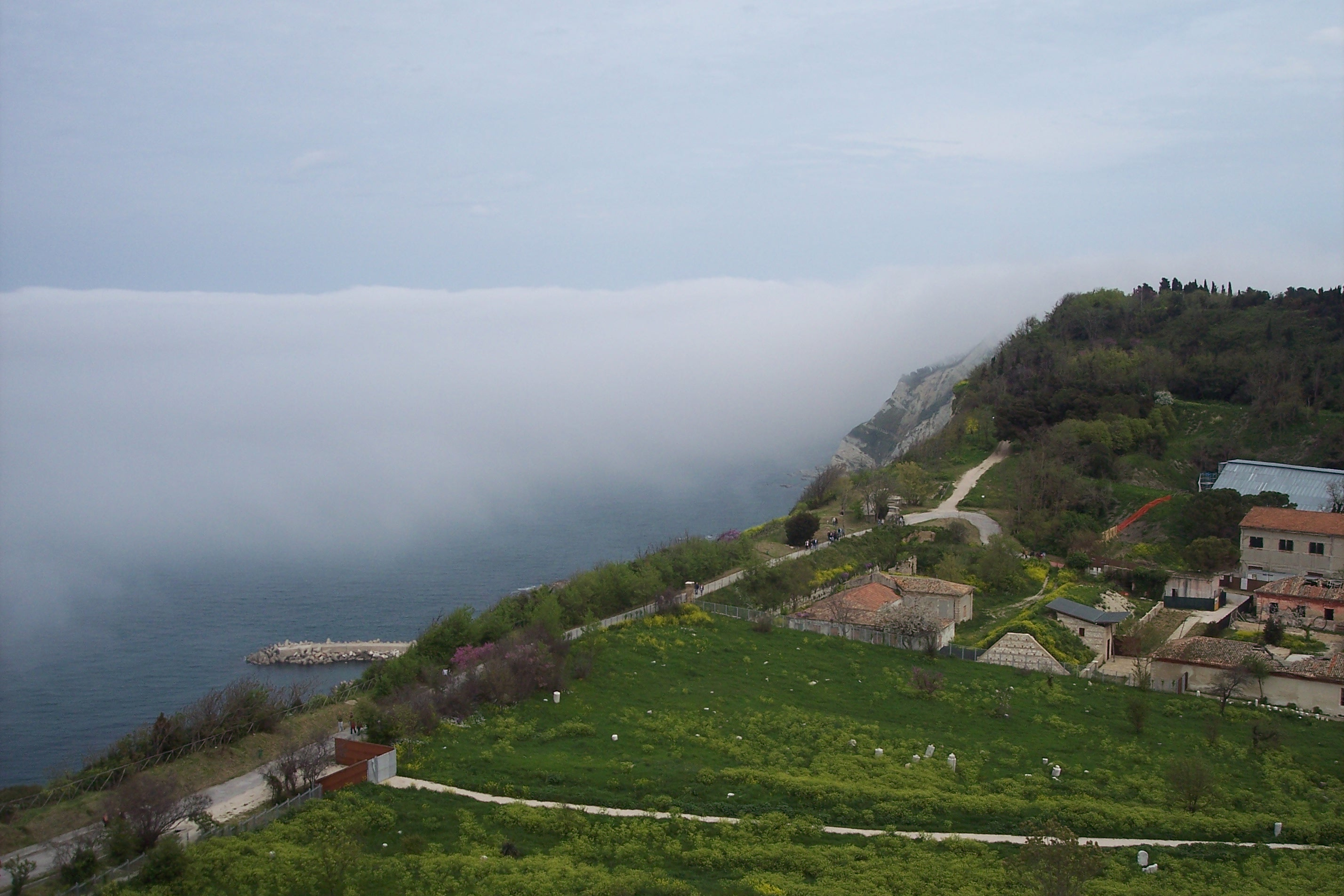 Parco del Cardeto